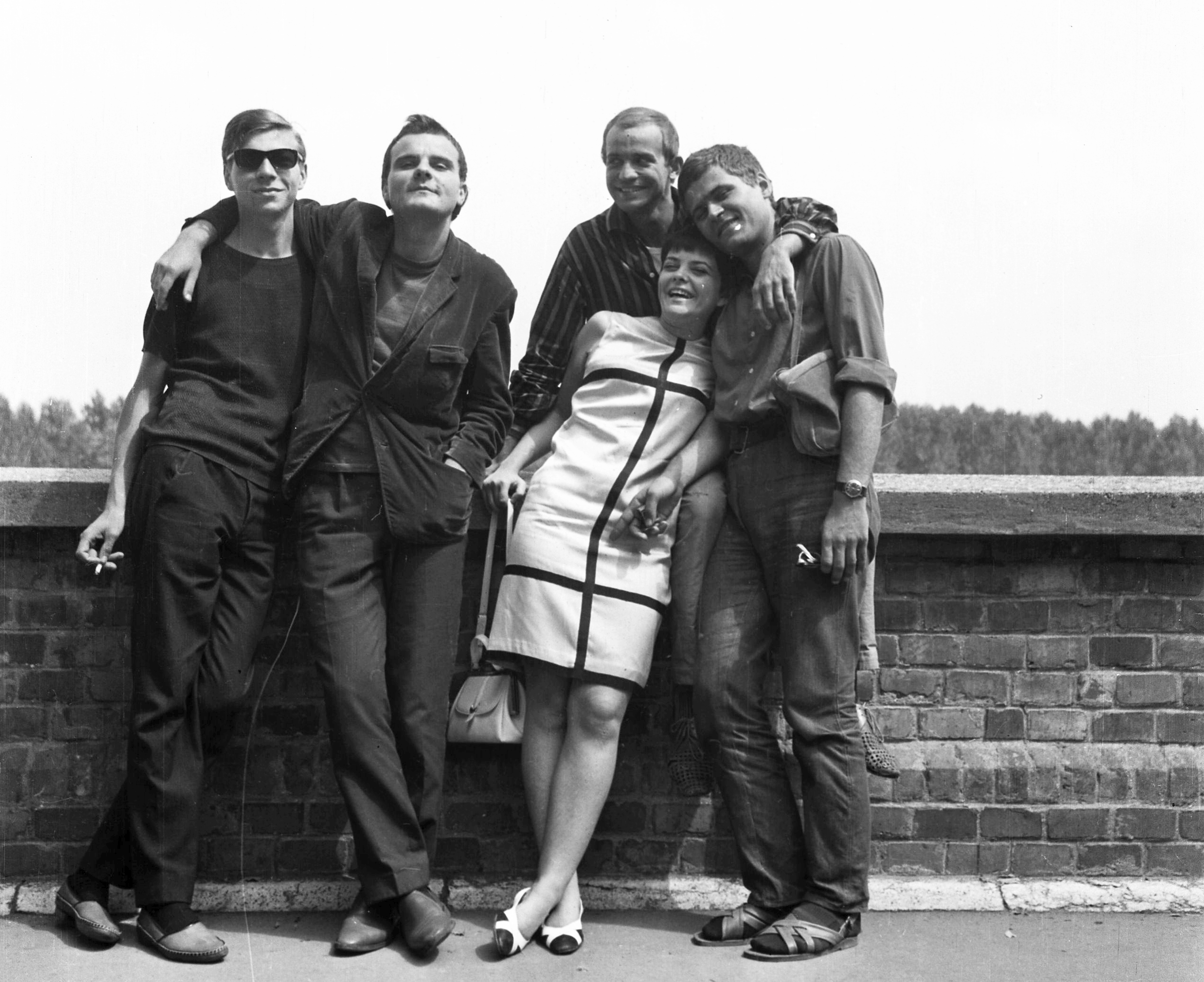 rakpart. Balról jobbra: Uri István, Kovács Lajos, Dózsa László, Jobba Gabi, Vajda László, a Színművészeti Főiskola hallgatói. Location: Hungary, Szeged Tags: actor, tableau, celebrity, shades, handbag, smoking, cigarette, fashion Title: rakpart. Balról jobbra: Úri István, Kovács Lajos, Dózsa László, Jobba Gabi, Vajda László, a Színművészeti Főiskola hallgatói.